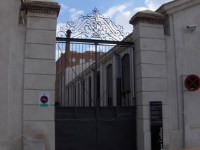 Edifici de l'antic Vapor Codina on trobem l'Àrea de joventut de l'Ajuntament de Sabadell